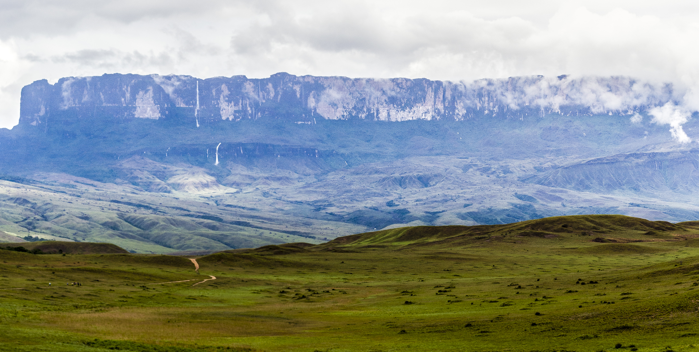 Roraima. Bolívar, Venezuela.